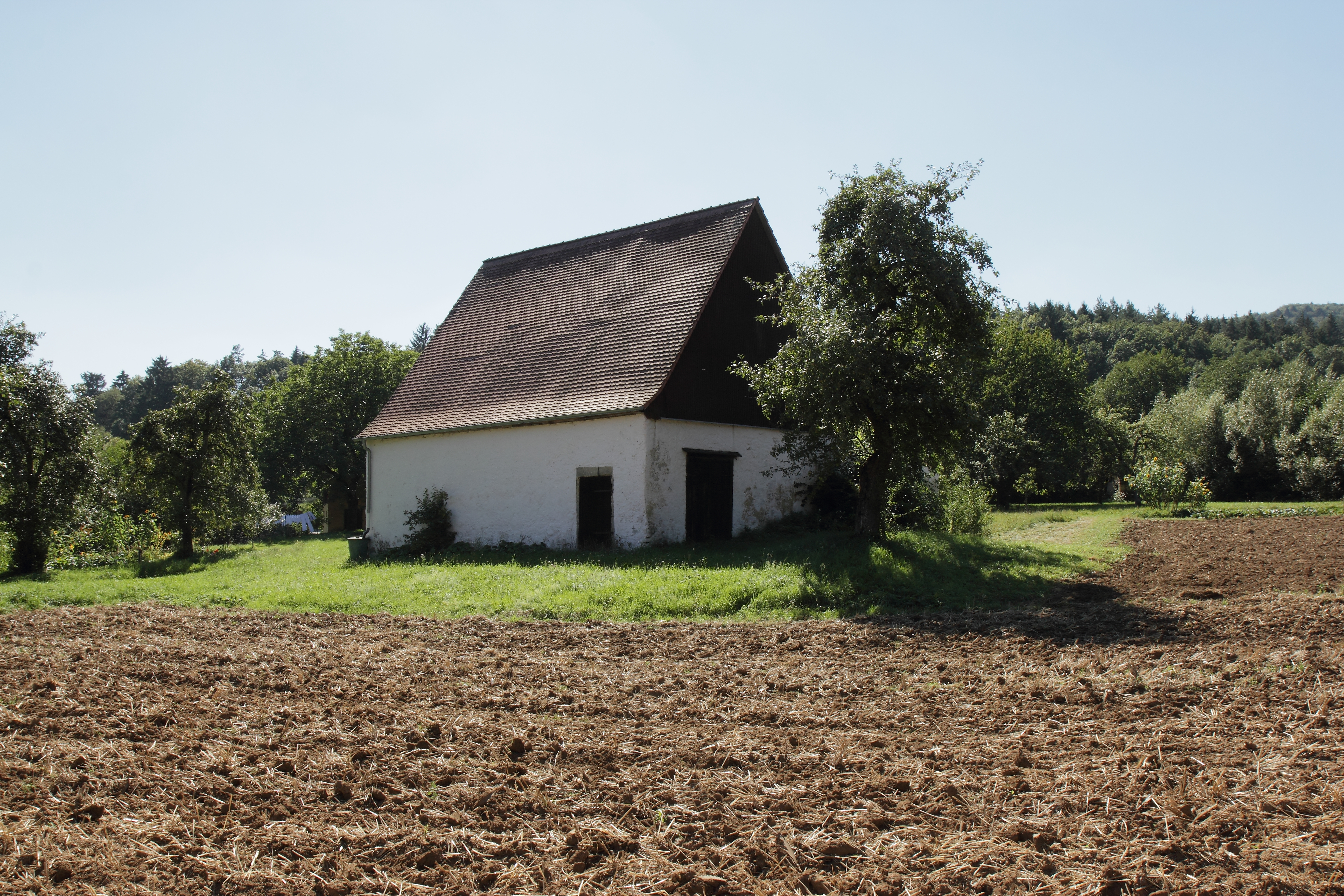 Turmhügel Rüssenbach - Ansciht des Turmhügels in Rüssenbach aus östlicher Richtung. Im Vordergrund ist noch der einstige Graben sichtbar